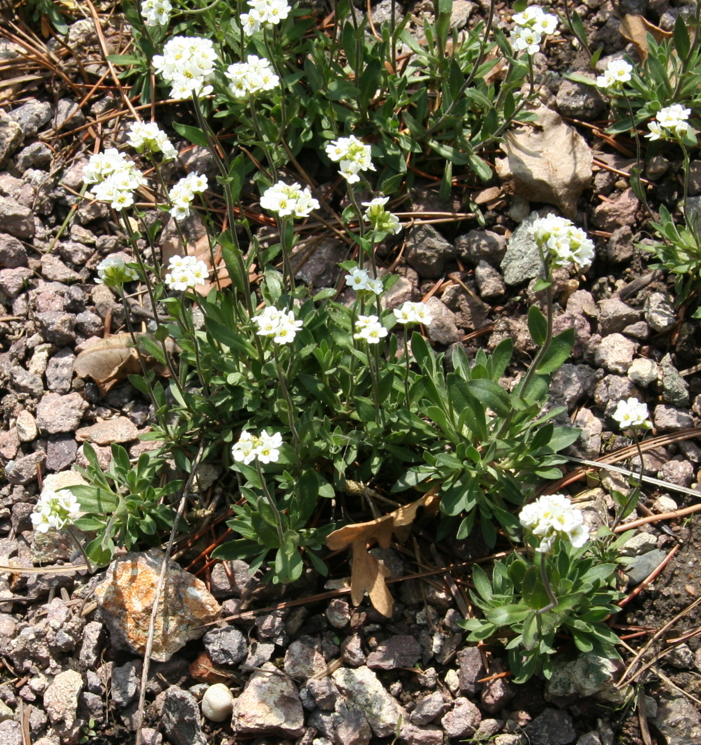 Draba arabisans im Botanischen Garten Dresden